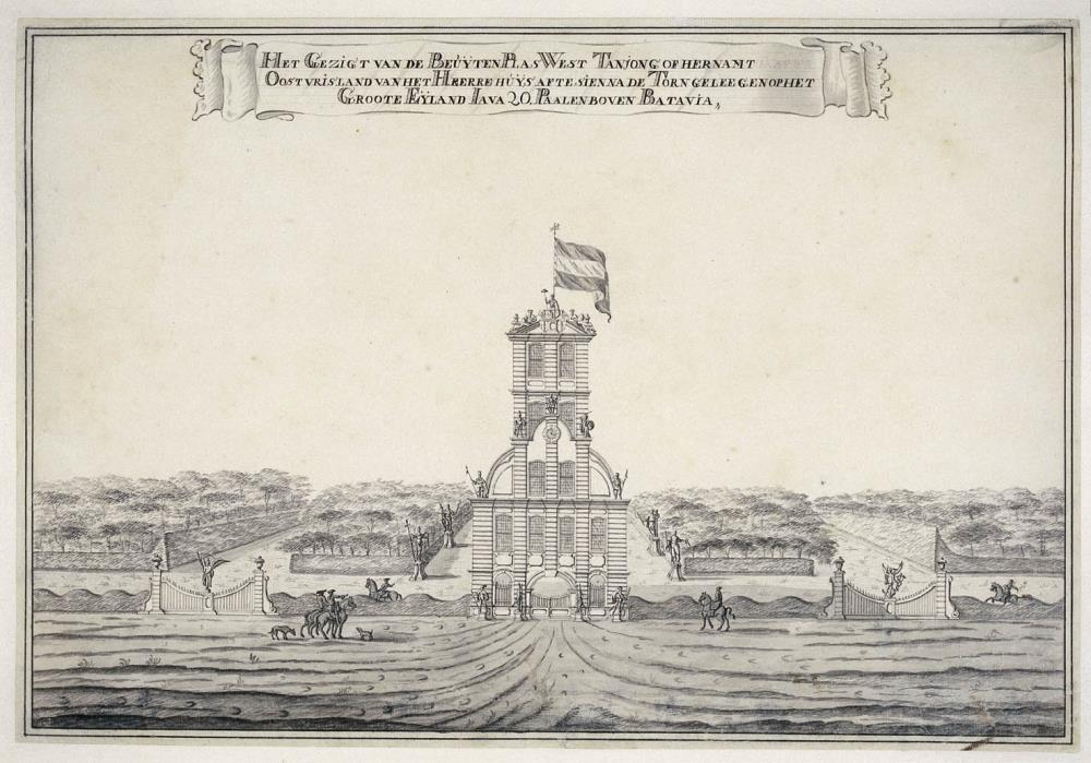 Gezicht op de toren van landgoed Tanjong West (Barat), ook wel genoemd Oostvriesland. Het landgoed was destijds in bezit van Jan Andries Duurkoop, die een kudde van 5000 stuks vee had en melkproducten leverde aan de Compagnie. De toren, die 25 meter hoog was, fungeerde als toegangspoort tot landgoed Tanjong West, 30 kilometer ten zuiden van Batavia. De reis van Batavia naar Tanjong West duurde, stroomopwaarts de rivier de Ciliwung, 48 uur, stroomafwaarts 6 uur.